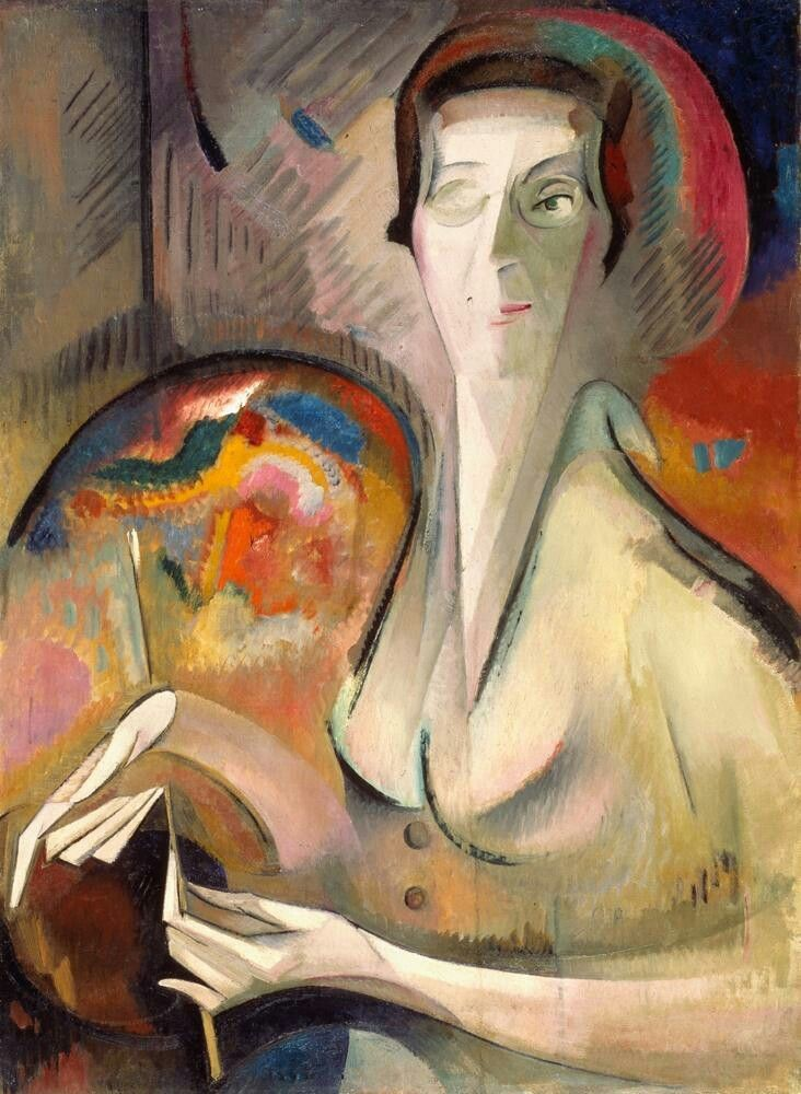 Óleo sobre lienzo. 32 x 23 El Museo Nacional de Mujeres en las Artes